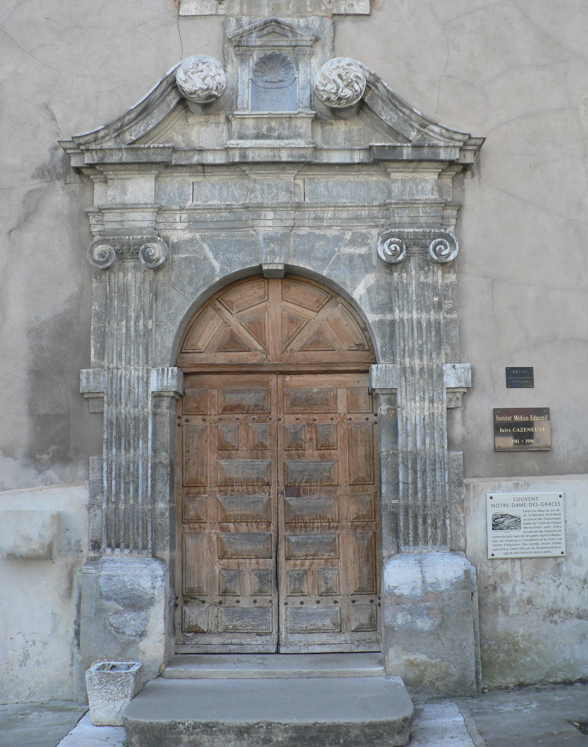 Prieuré Notre-Dame de Grâce, (Inscrit, 1963)